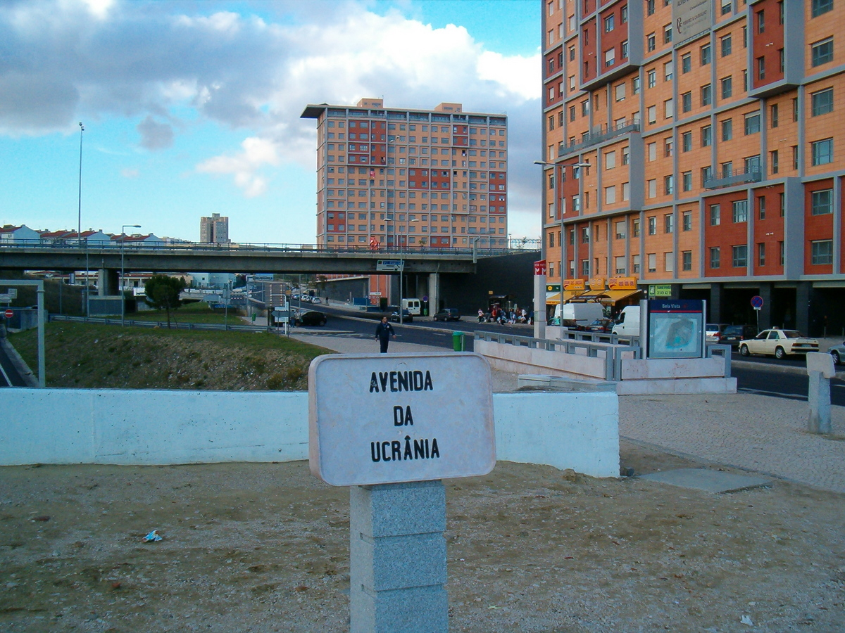 Avenida da Ucrânia em Lisboa - placa toponímica